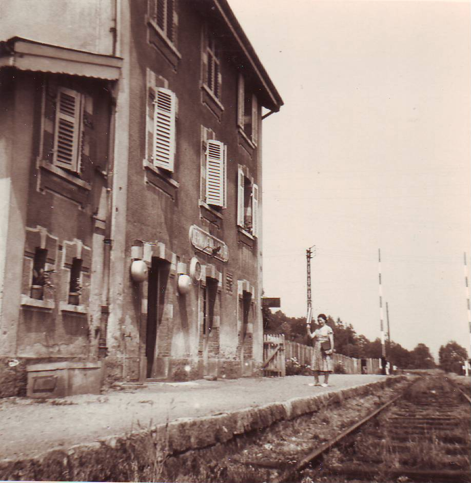 la gare en activité vers 1966